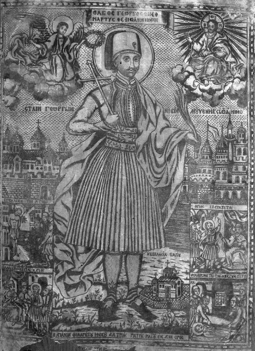 ГРАФИЧКАТА ИКОНА НА СВЕТИ ГЕОРГИЈ ЈАНИНСКИ ОД ЦРКВАТА ВО КИЧИНИЦА